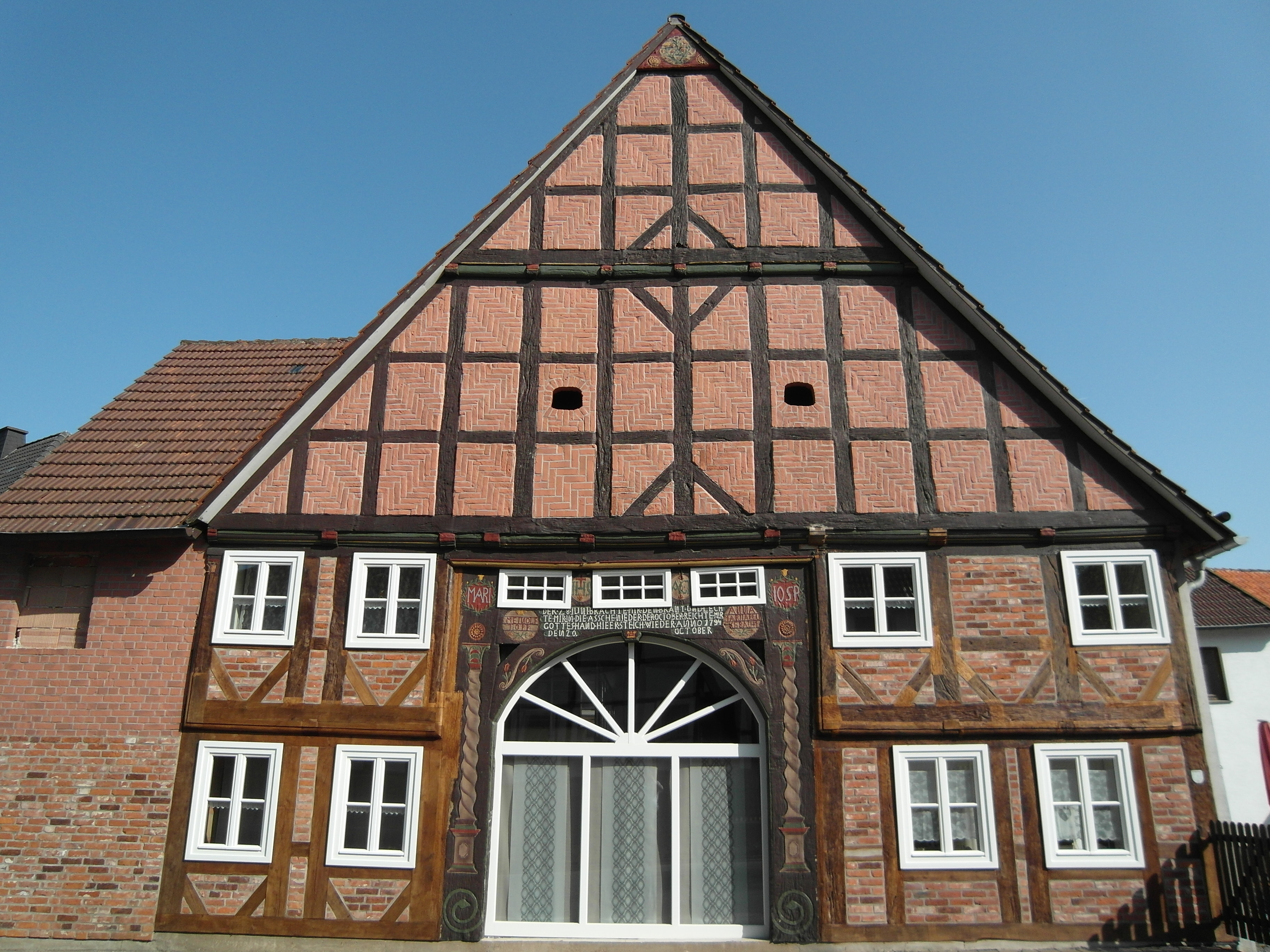 Dieses Foto zeigt die Fassade des Bauern- und Wirtschaftshauses in der Meinolfusstr. 15 in Bellersen (Brakel). This is a photograph of an architectural monument.